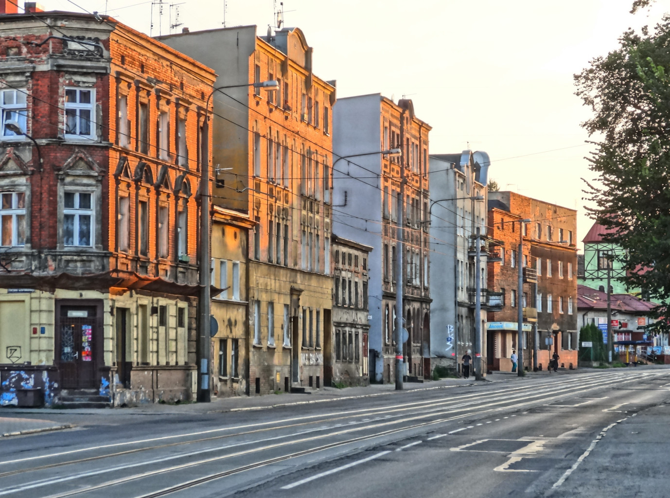 Ulica Nakielska w Bydgoszczy